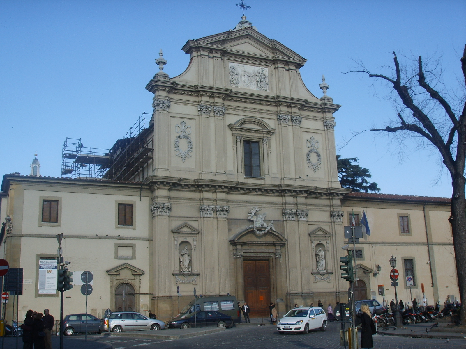 Facciata di san Marco (2007) after restoration